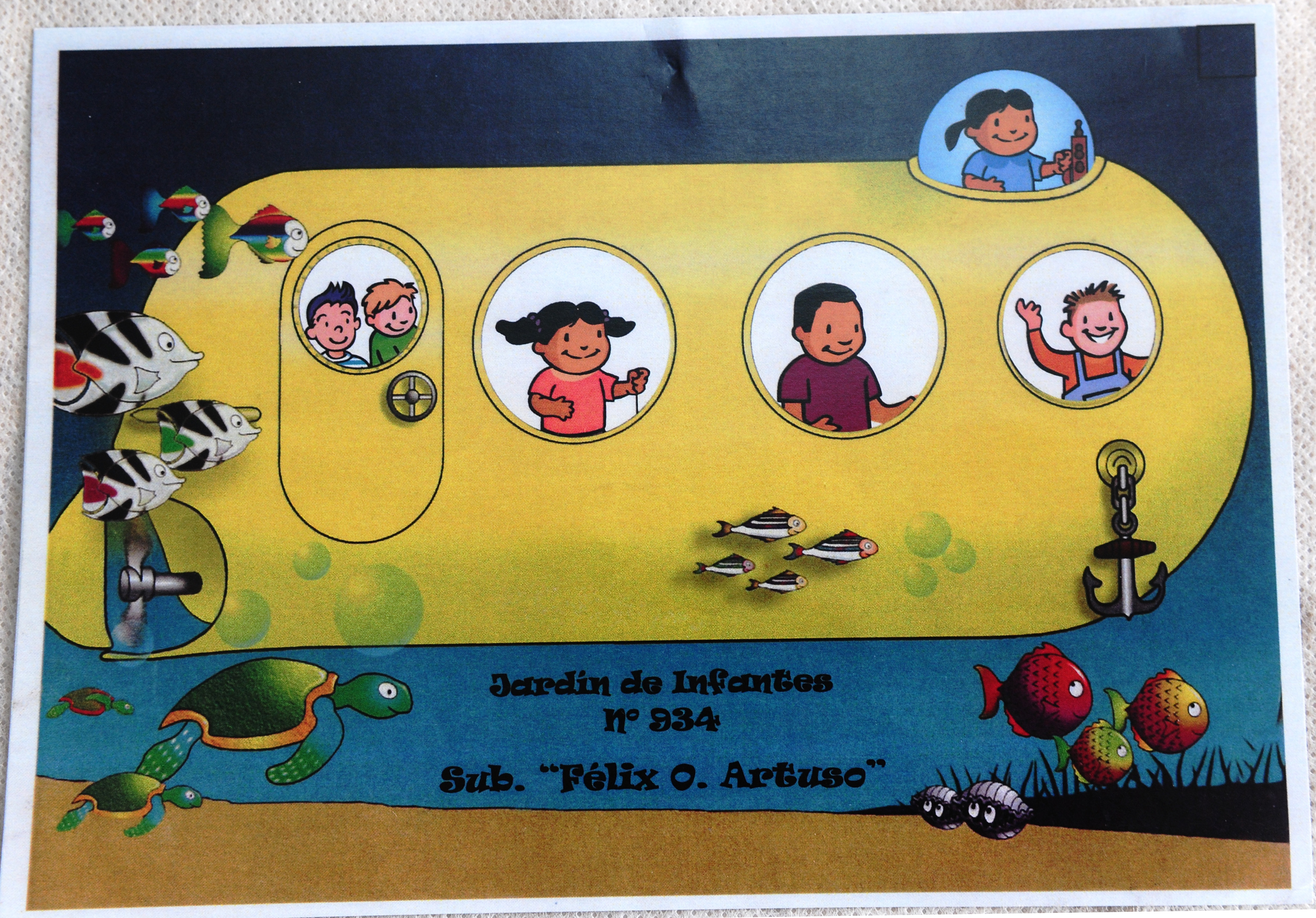 El Jardín de Infantes Nº 934 Sobof. Félix Artuso, de Mar del Plata, Prov. de Buenos Aires (Argentina) Foto: Fabián Gastiarena